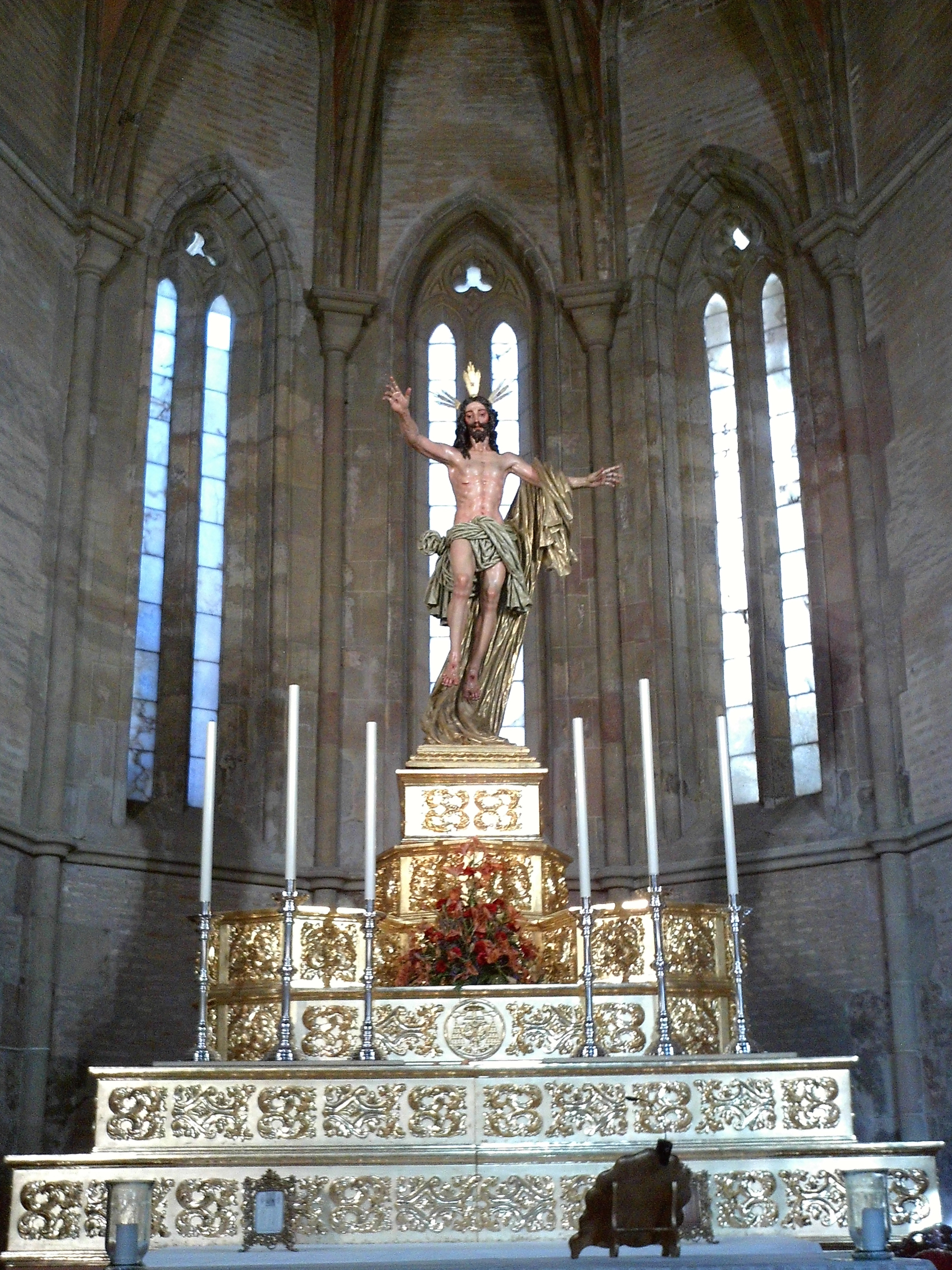 Jesucristo Resucitado. Francisco Buiza Fernández, 1973. Iglesia de Santa Marina. Sevilla, Andalucía, España.